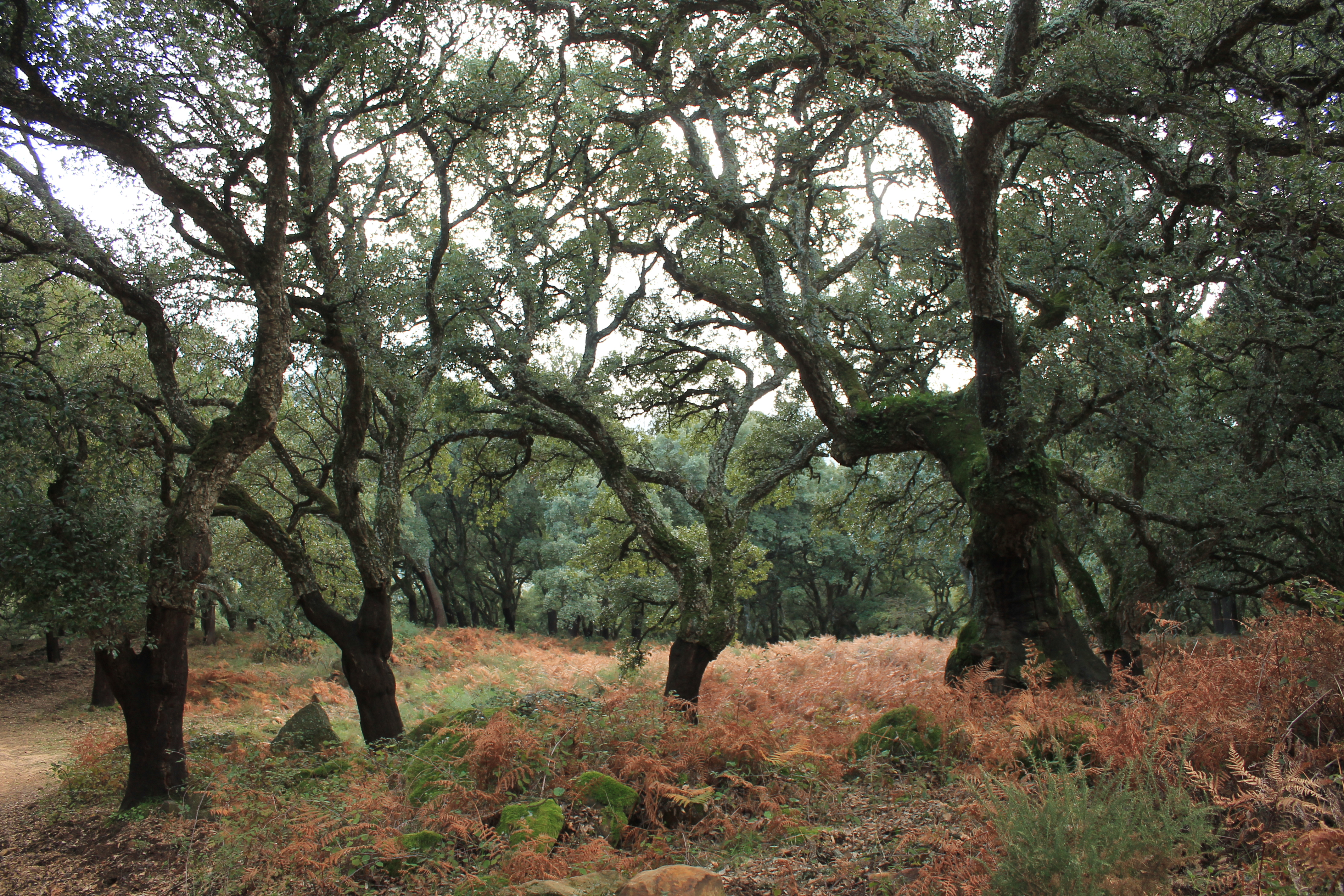 Parque natural de Los Alcornocales This is a photography of a Site of Community Importance in Spain with the ID: ES0000049. Natura2000 entry, EEA entry